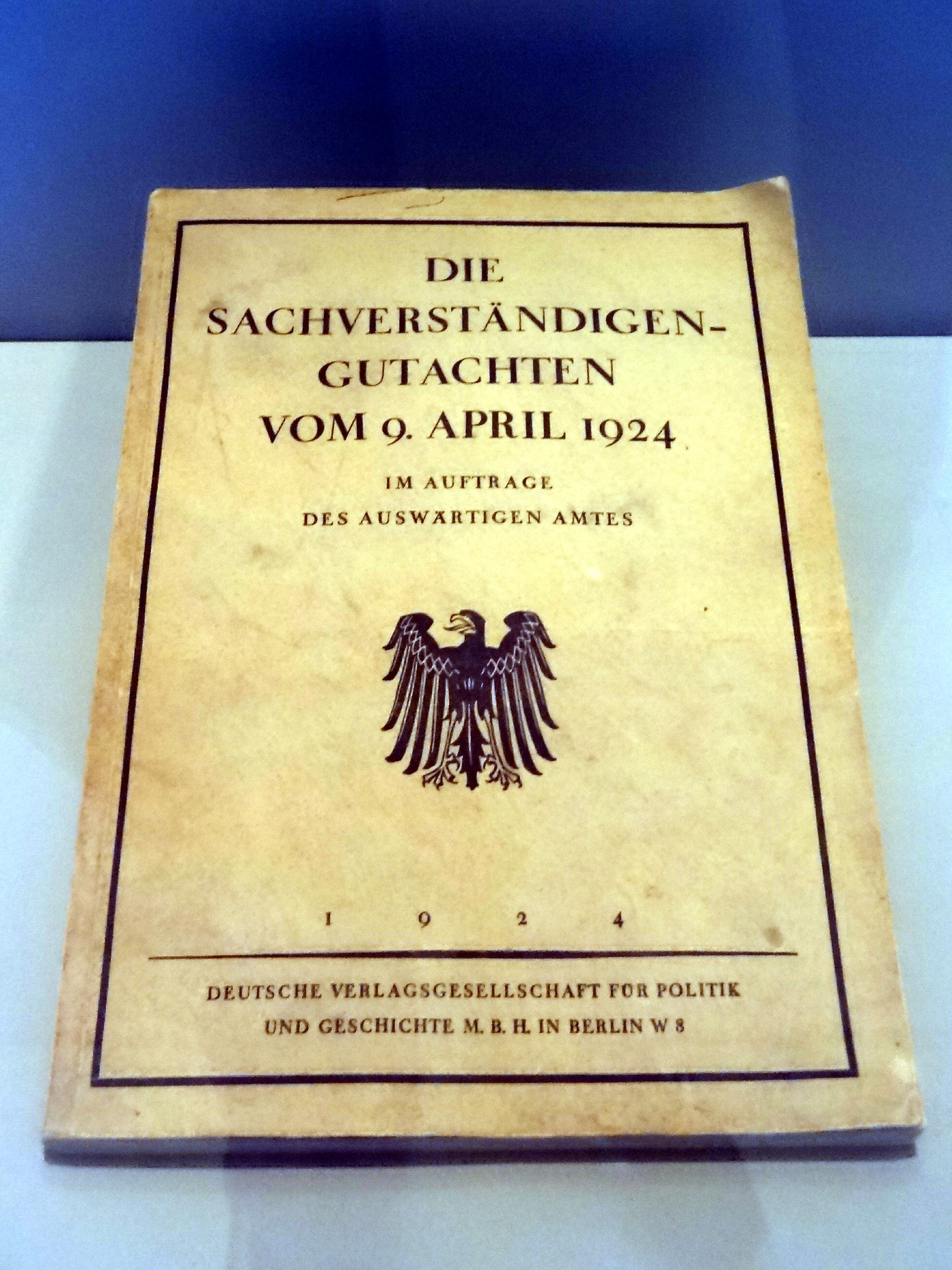 Die Sachverständigen-Gutachten vom 9. April 1924 ; Im Auftrage des Auswärtigen Amtes ; 1924 ; Deutsche Verlagsgesellschaft für Politik und Geschichte M. B. H. in Berlin W8